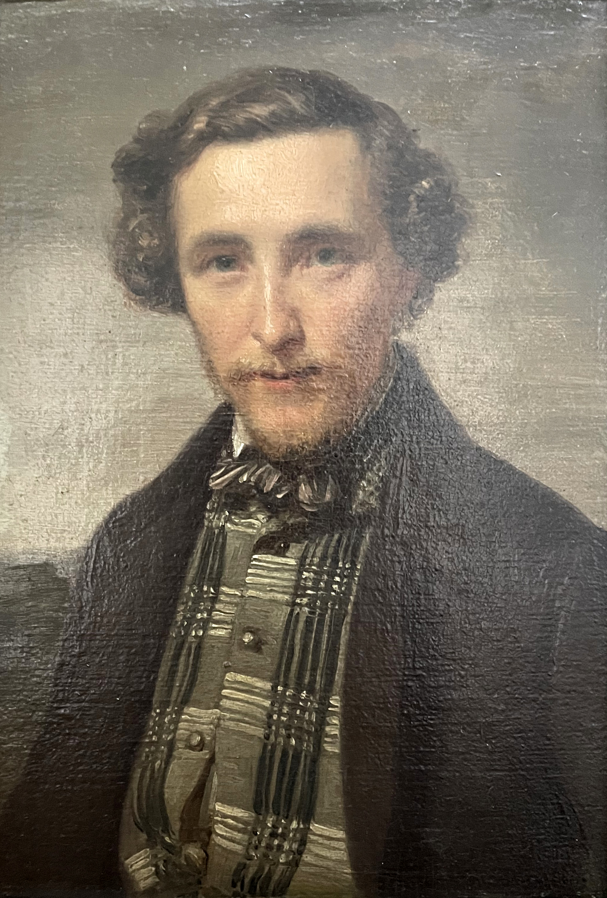 8 Klein - Porträt Wilhelm Klein (1821–1897) - in Freundschaftsgalerie von Einzelbildnissen der Düsseldorfer Malerschüler und ihren Freunden (Vermächtnis des Künstlers)